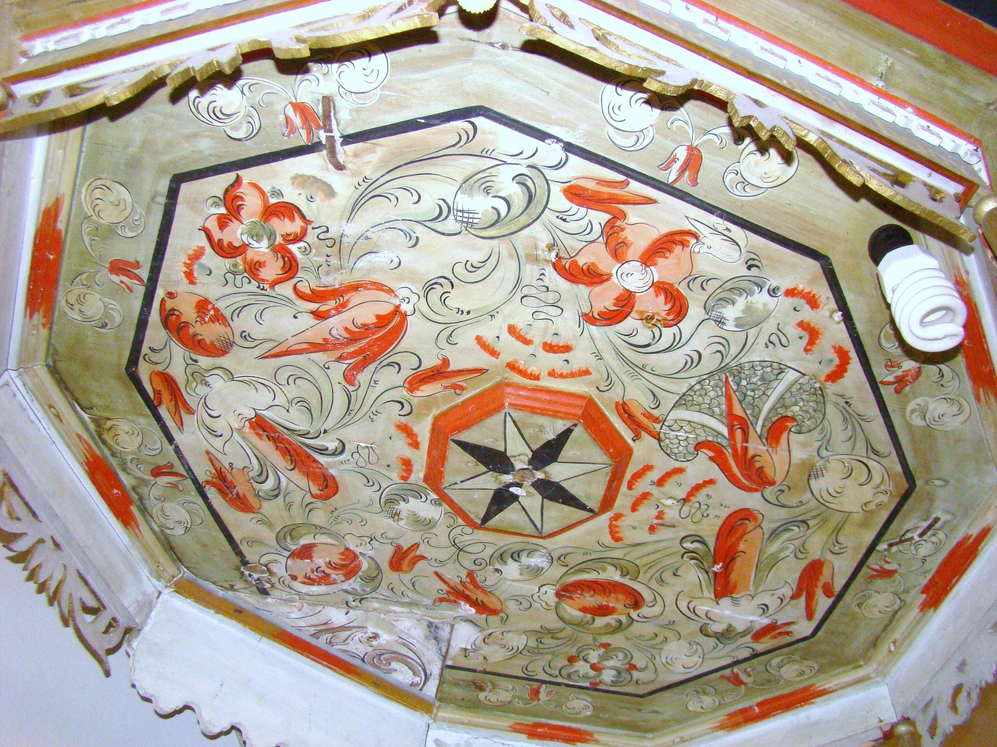 Biserica reformată, sat DUMBRAVA; comuna CĂPUŞU MARE, județul Cluj